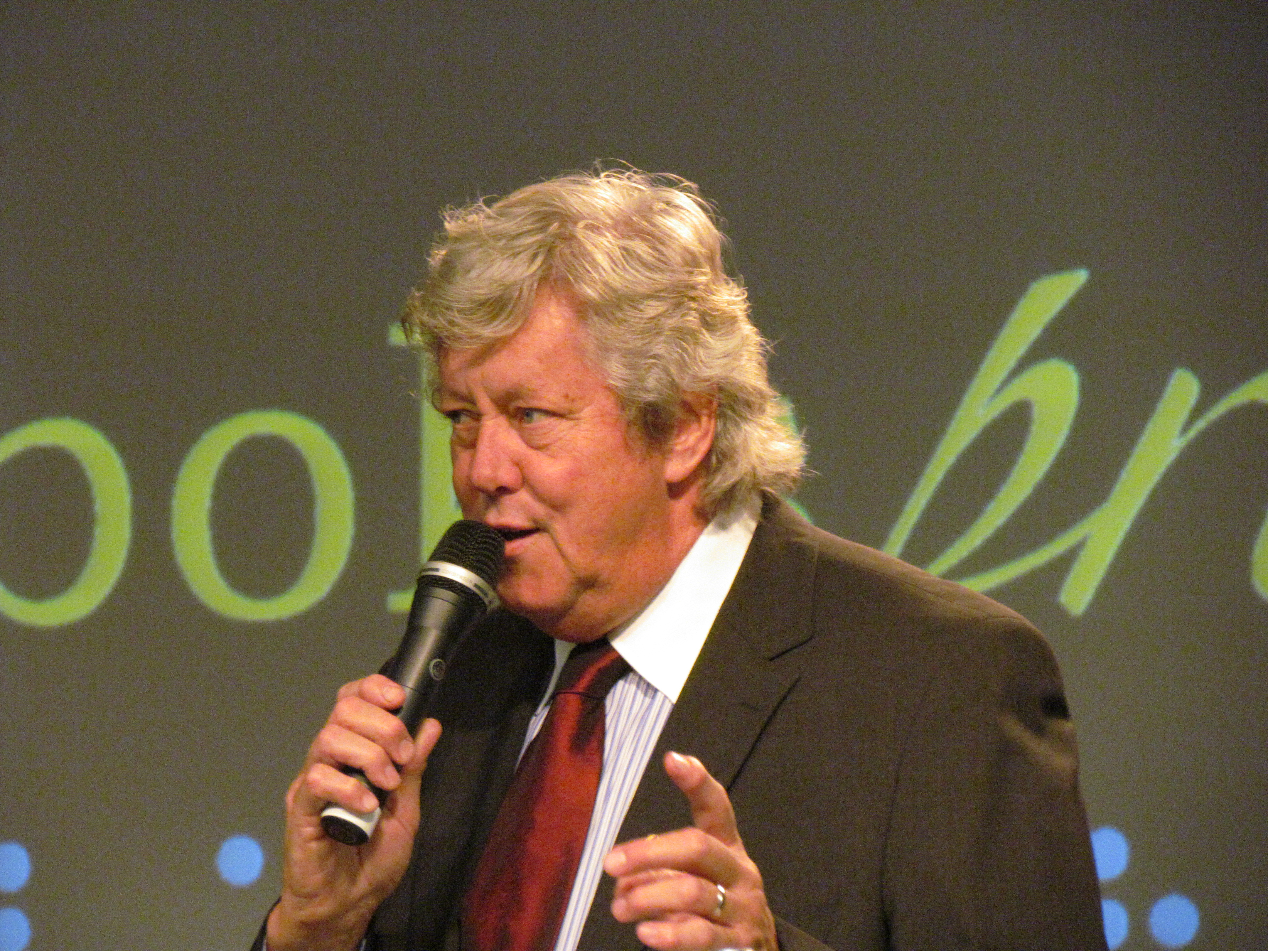 Ulf Elfving presenterar Ljudbokspriset på Bokmässan 2011.